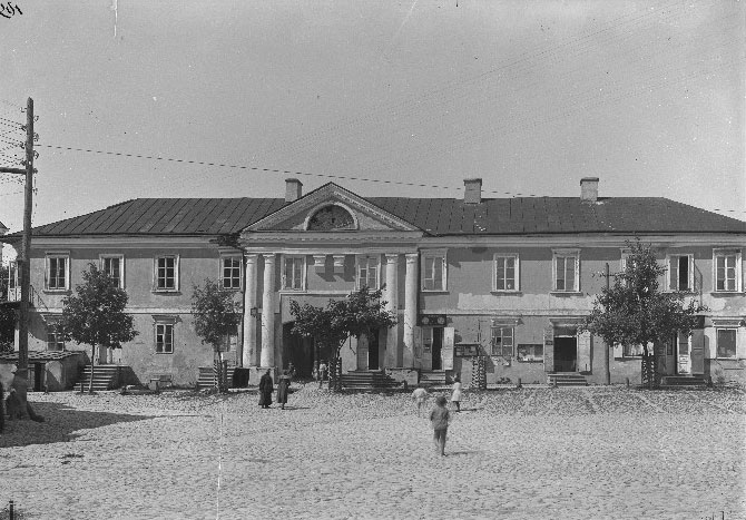 Беларуская (тарашкевіца): Наваградак. Палац Радзівілаў на Рынку